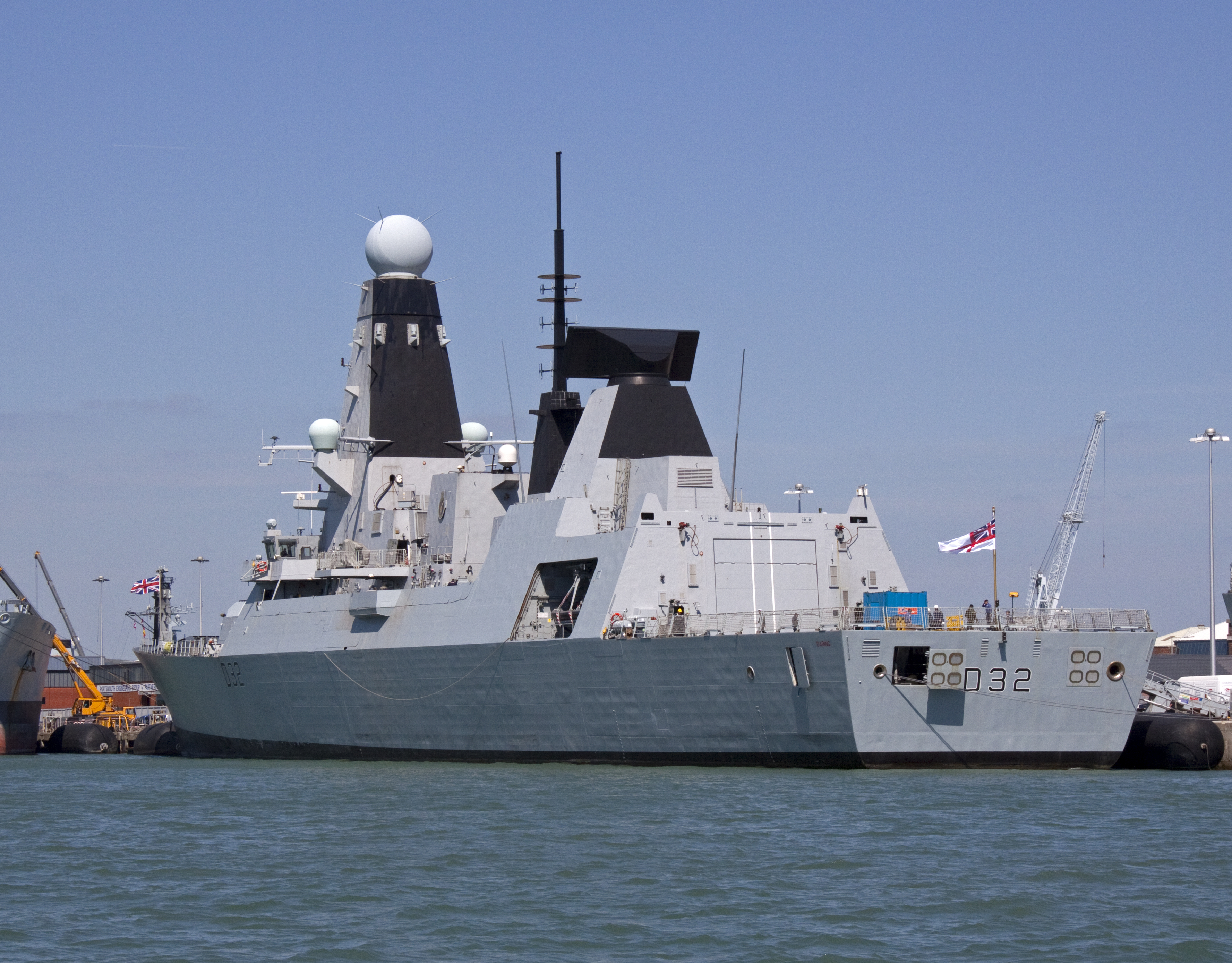 HMS Daring D32 Stern